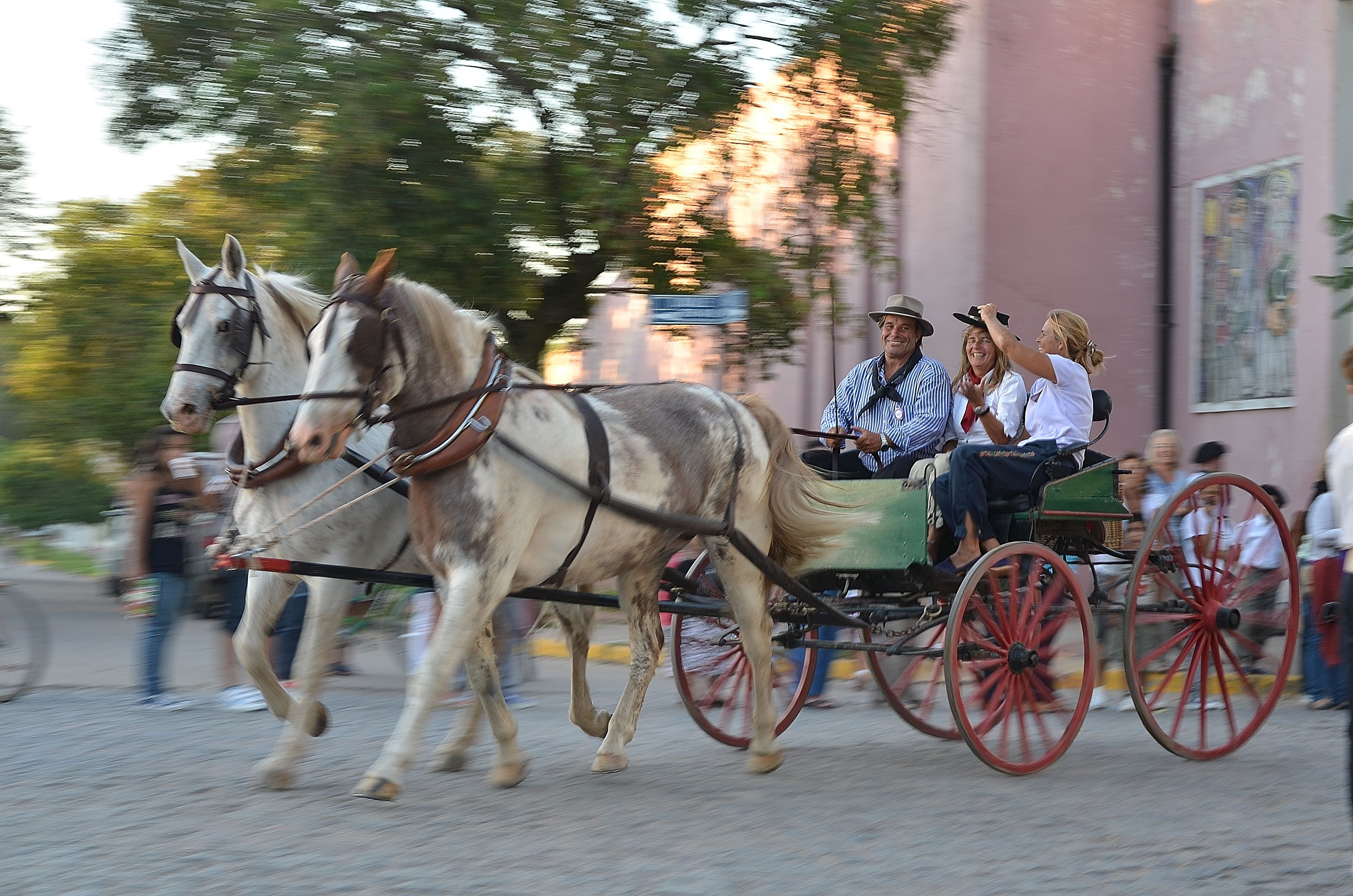 Sector del casco urbano de San Antonio de Areco y Estación del Ferrocarril Nuevo Central Argentino